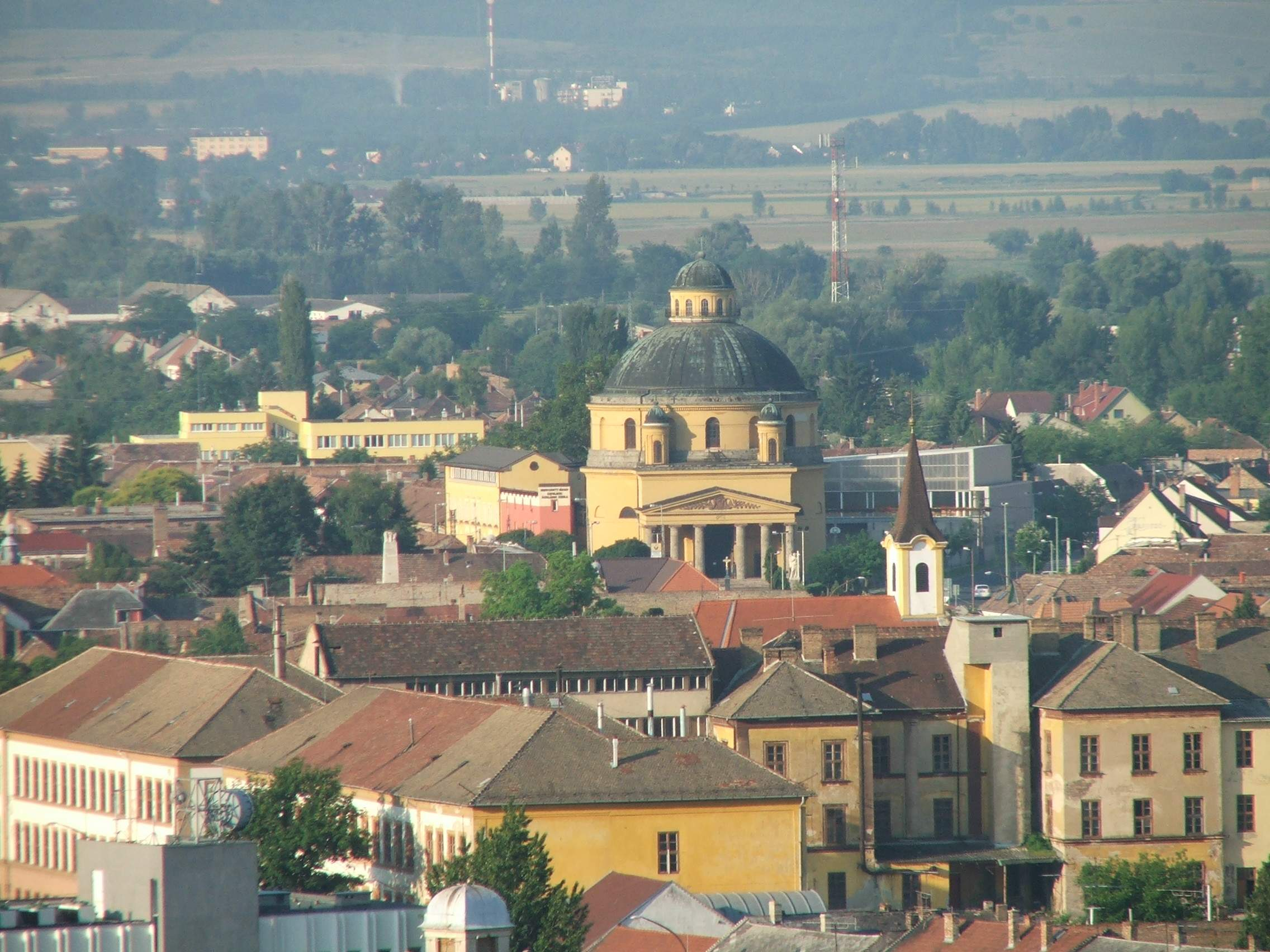 A Kerektemplom